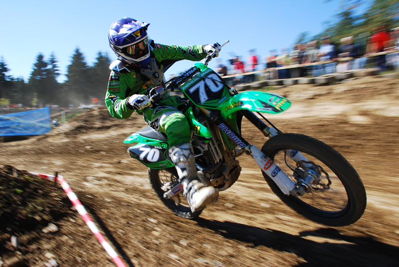 Motocross